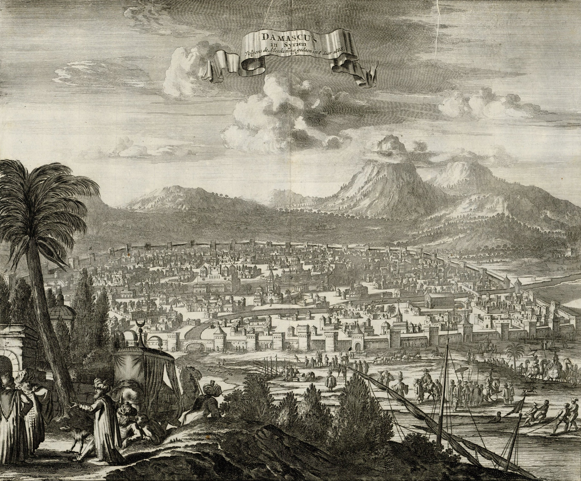 Ansicht von Damaskus. Grafik von Olfert Dapper aus dem Jahr 1677. Heute in Amsterdam.